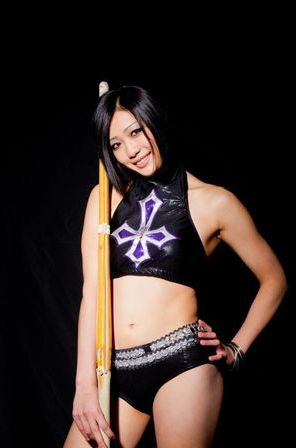 NOZAKINAGISA2012